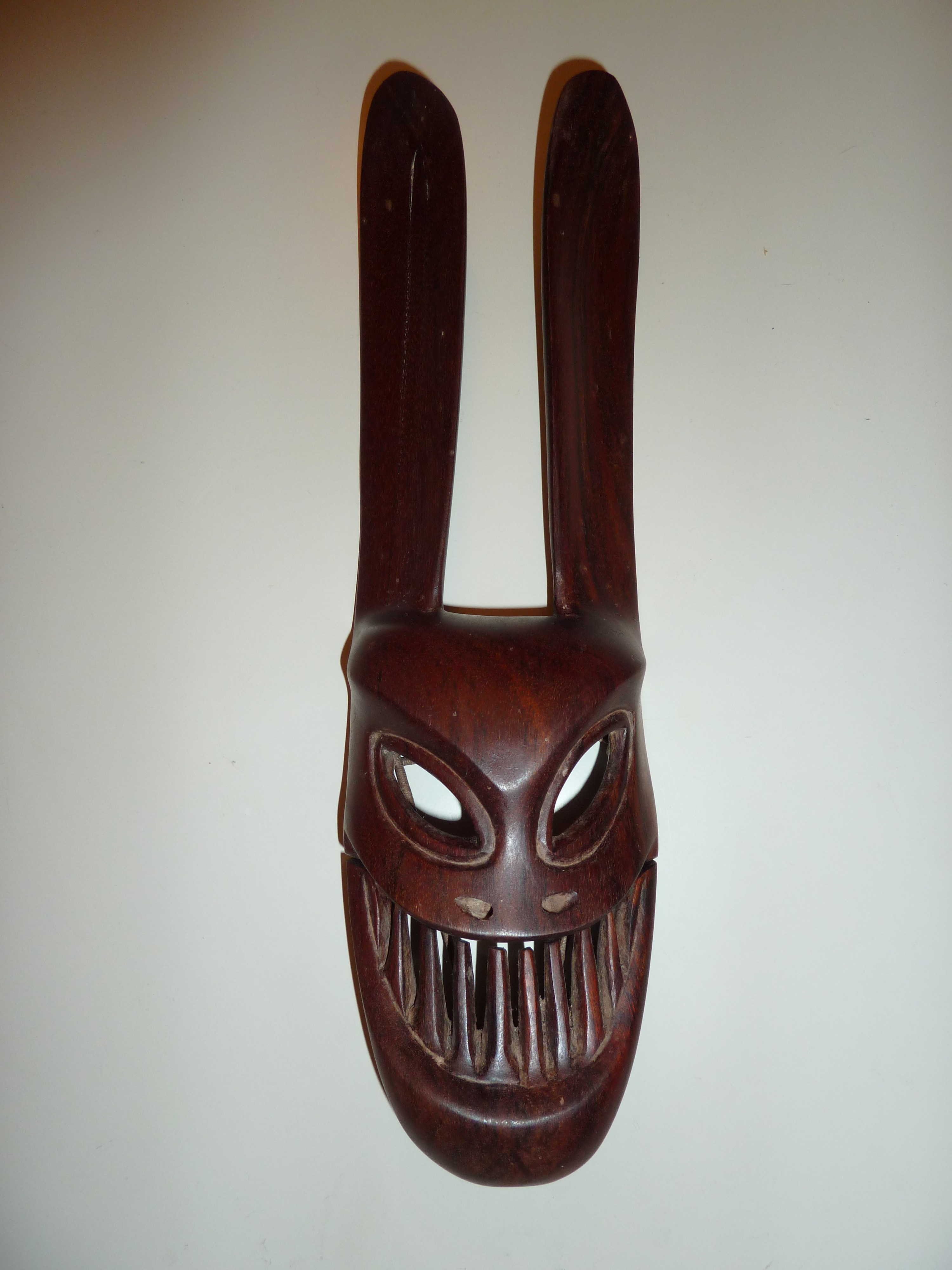 Mah Meri spider spirit mask